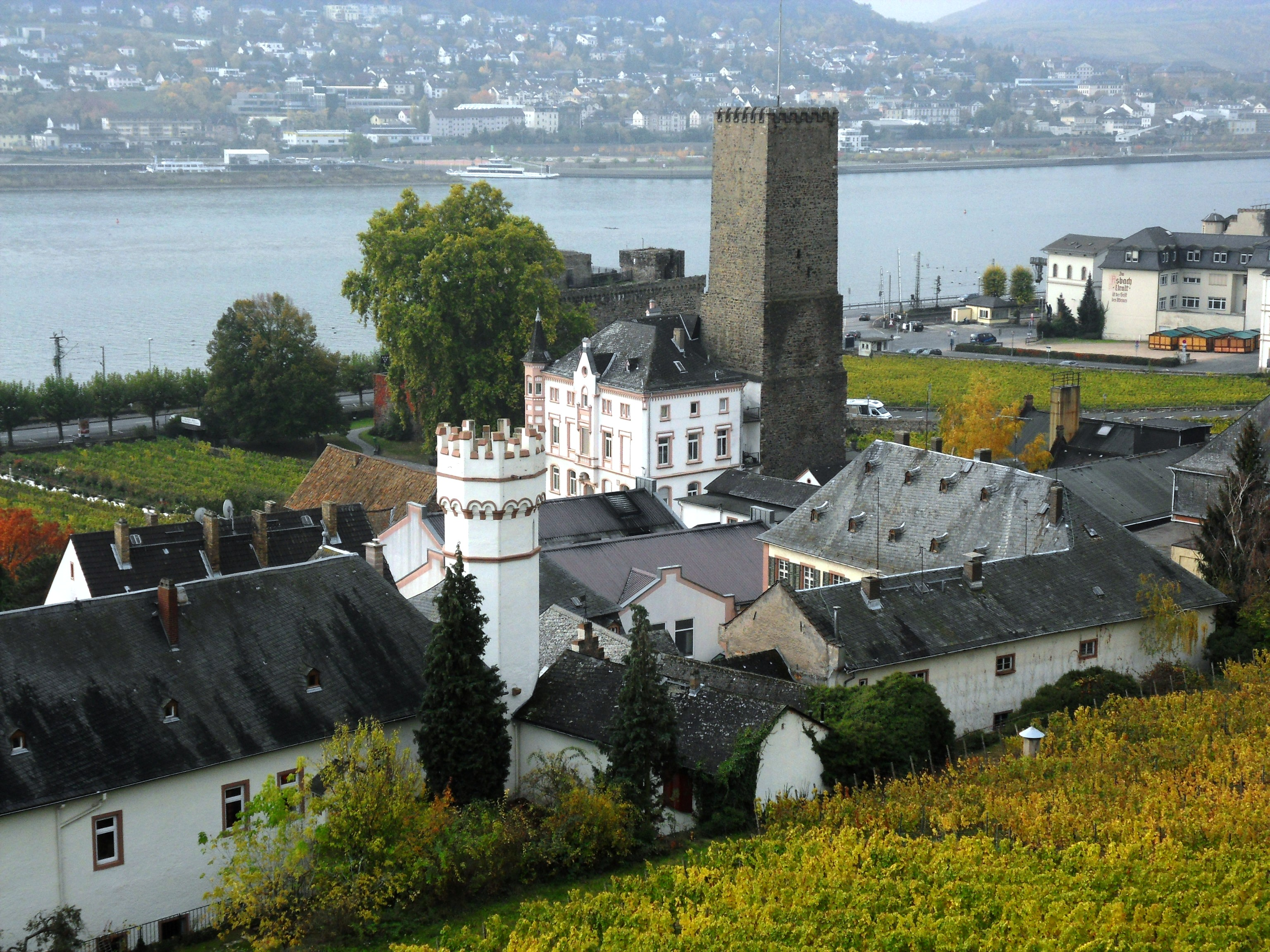 Blick von der Seilbahn in Rüdesheim am Rhein zur Boosenburg mit der Villa der Weinkellerei Carl Jung. Dahinter, halb verdeckt, die Brömserburg und am rechten Bildrand Gebäude des Asbachgeländes